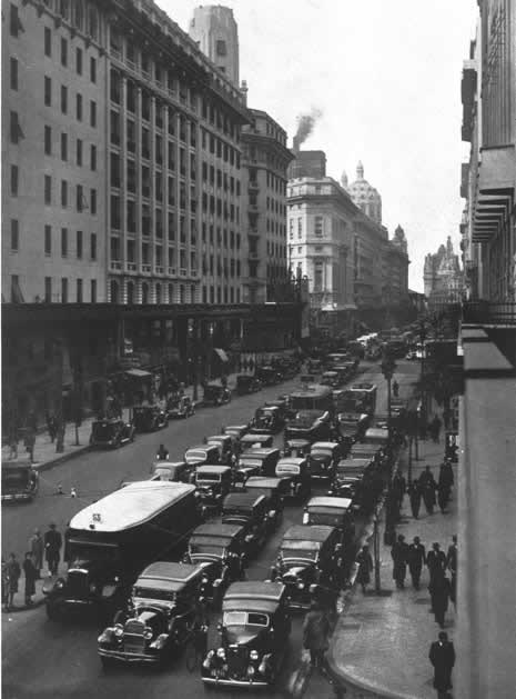 La Av. Diagonal Norte en una fotografía sin fecha, posiblemente de la década de 1930.